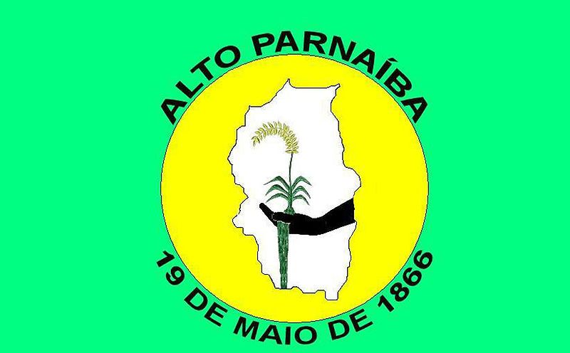 Bandeira de Alto Parnaíba, estado do Maranhão, Brasil.